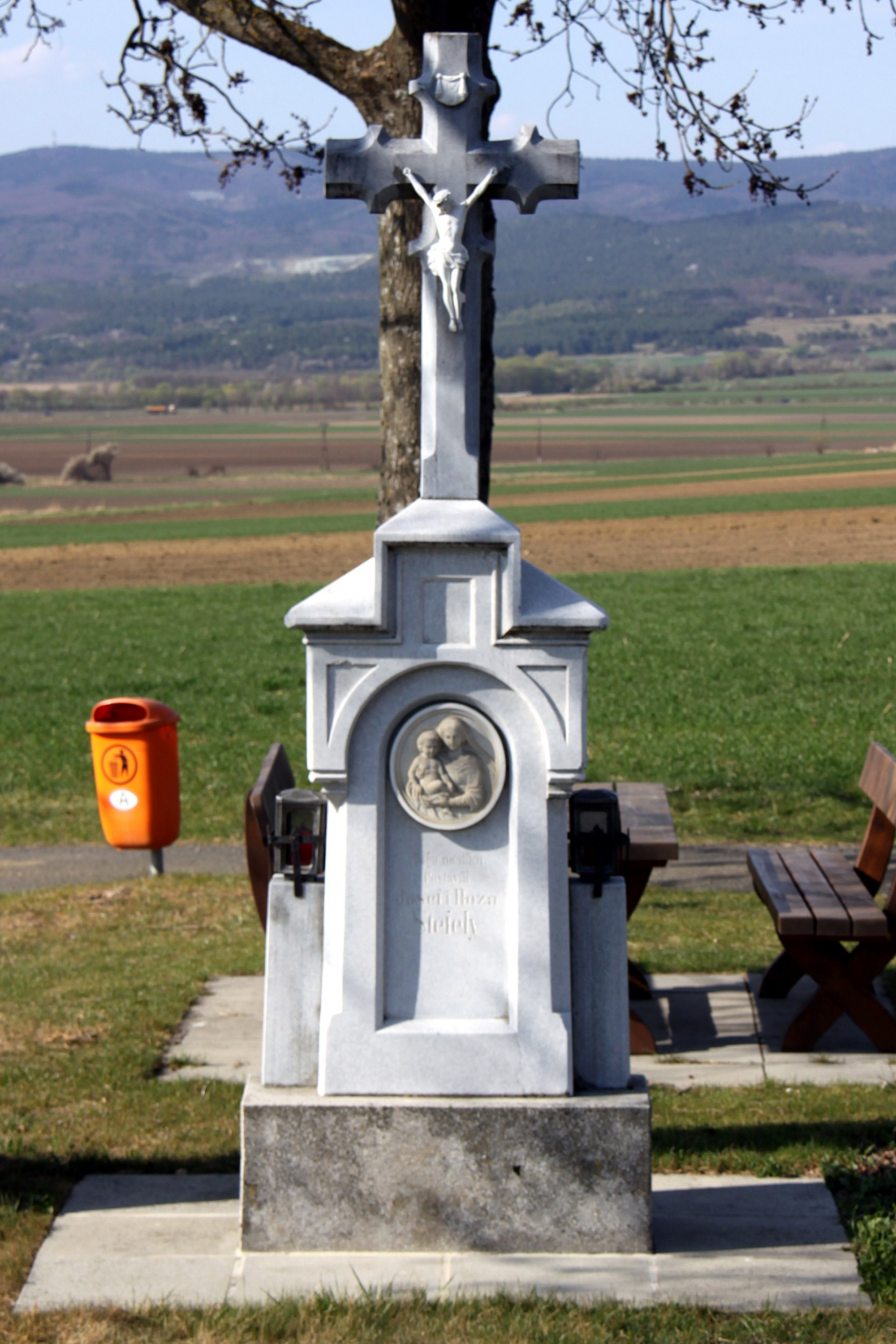 Schachendorf - Kruzifix auf Grundstück Nr. 3388